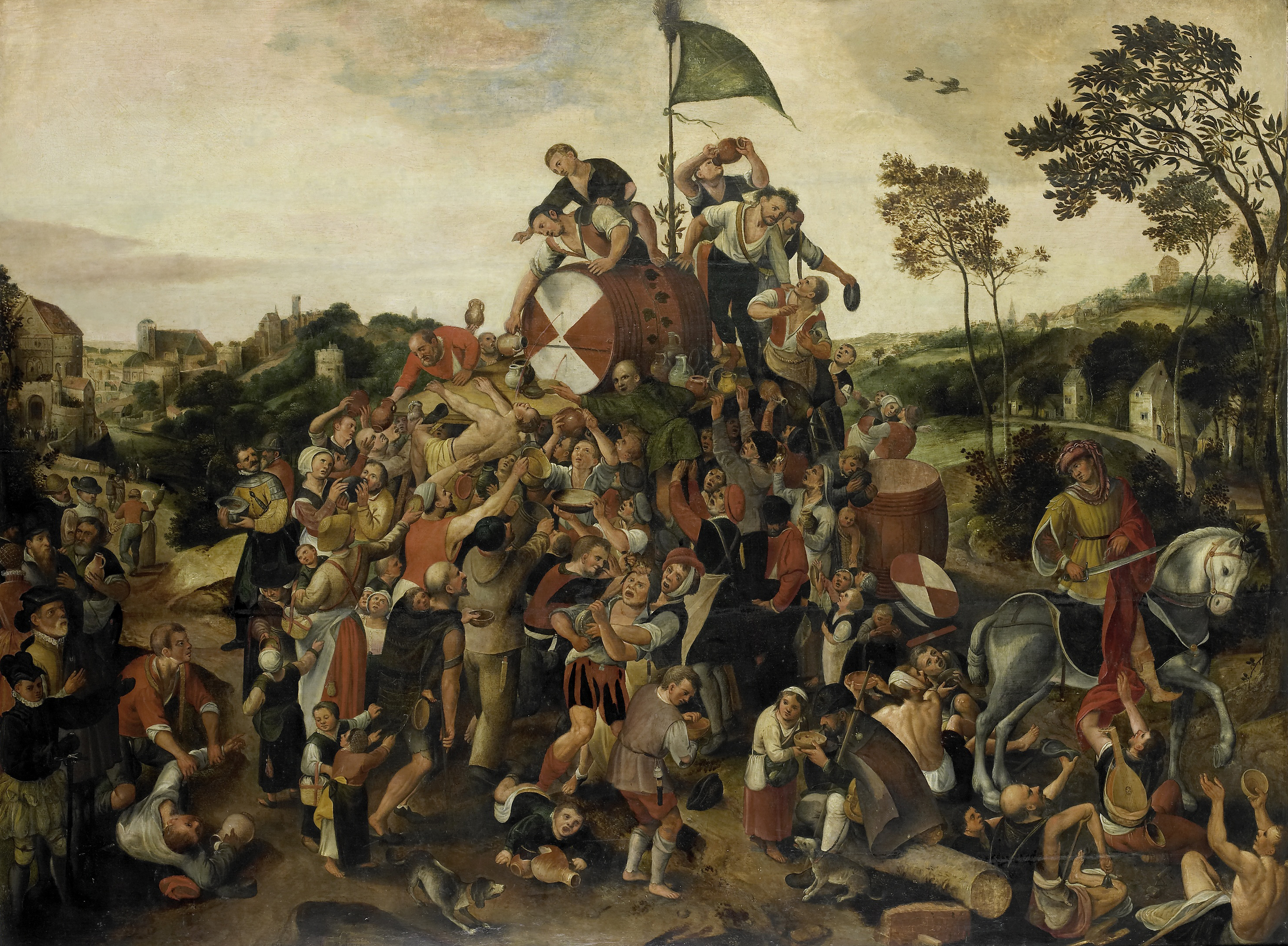 De Sint Maartenskermis. Een menigte vecht en verdringt zich rond een vat wijn. Rechts de heilige Martinus die zijn mantel deelt met bedelaars. Op de voorgrond een bedevaartganger.